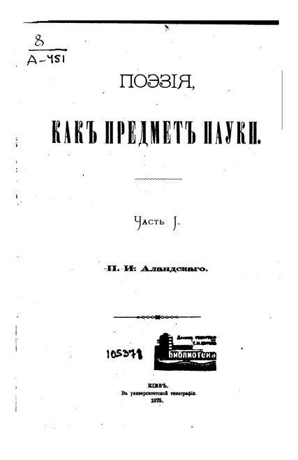 Аландский П.И. «Поэзия как предмет науки»